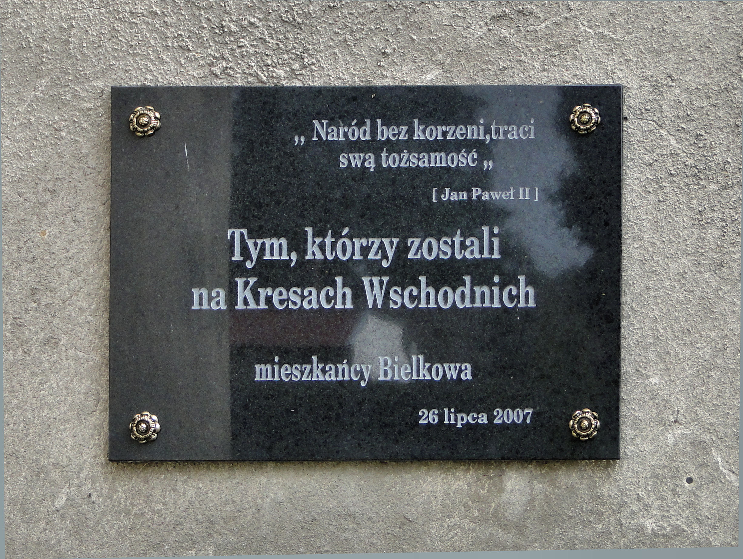 Kościół w Bielkowie w powiecie stargardzkim